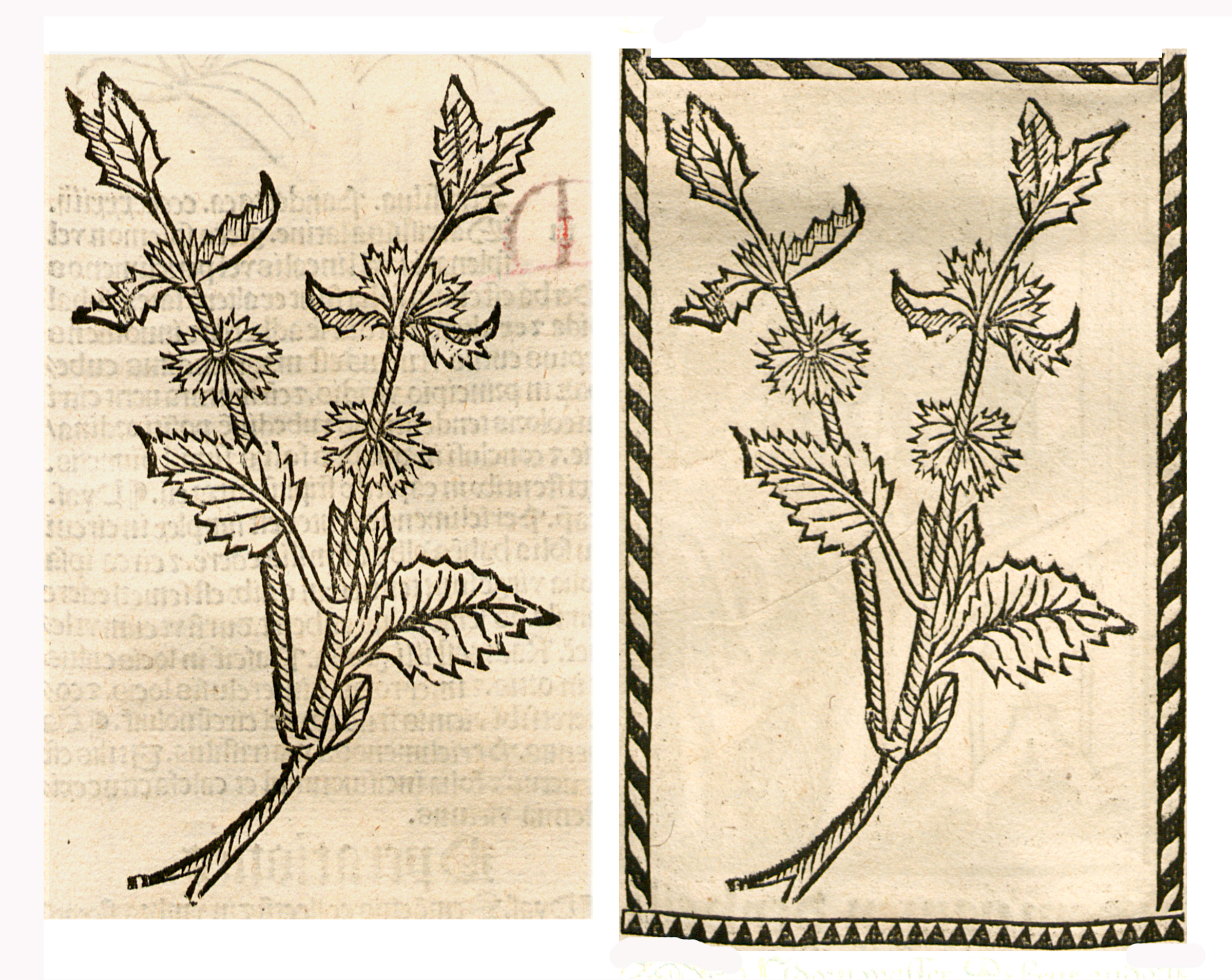 Abbildung von: Andorn